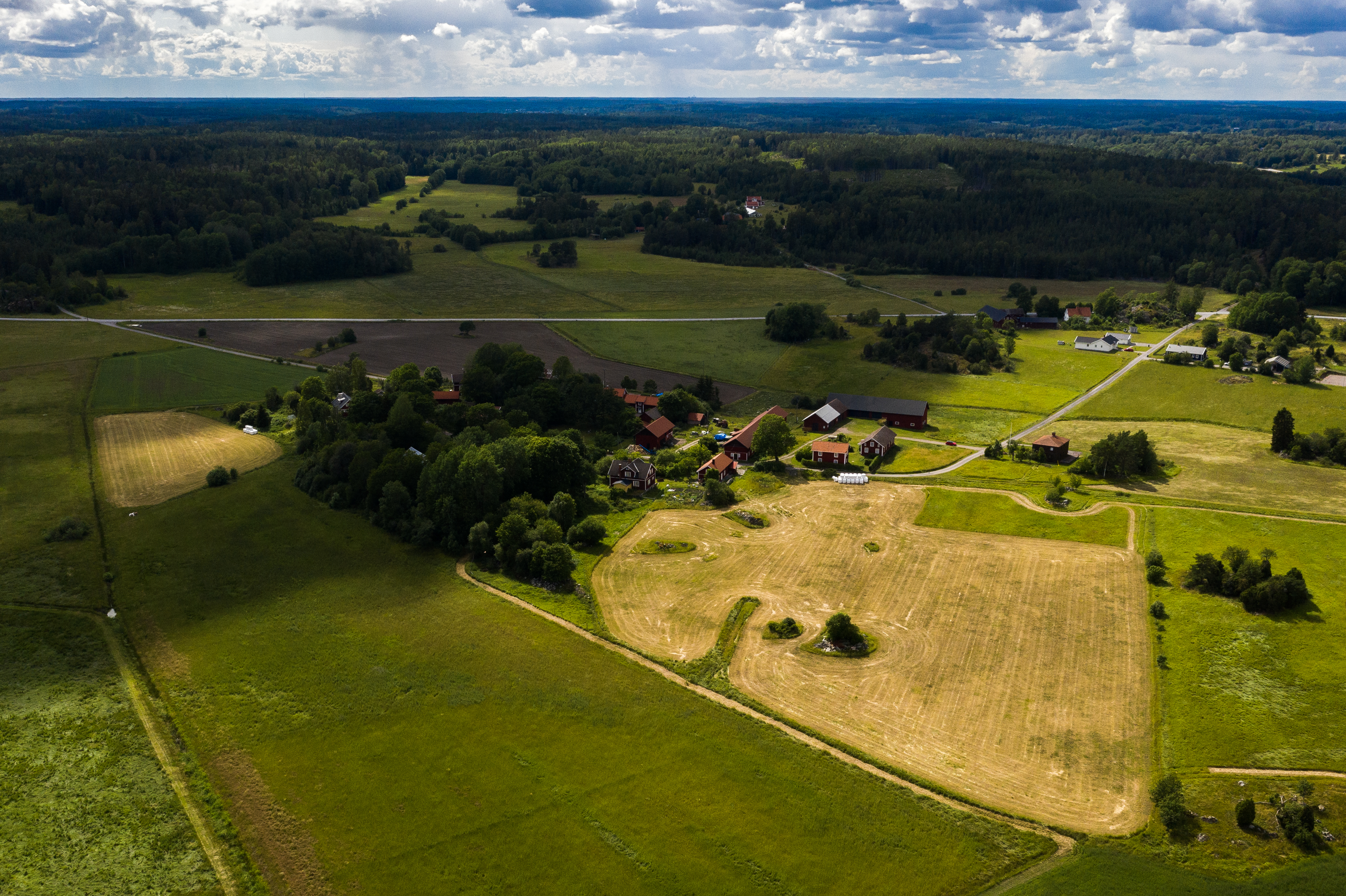 I förgrunden Darsgärde by. Upp till höger i bild syns Gammelbyn, idag en ensam gård belägen intill väg 77. Bortom väg 77, en bit upp mot skogen syns ett par hus i Nybyn. Både Gammelbyn och Nybyn ligger i Darsgärde.